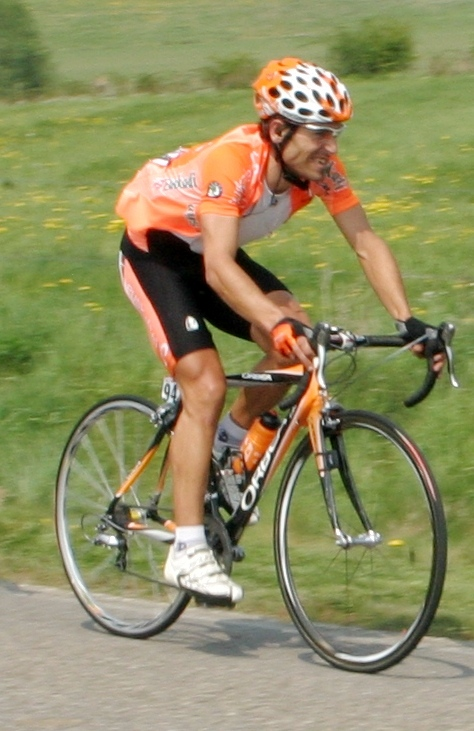 Den Unaï Etxebarria an der Entrée vun Tavigny a Liège - Bastogne - Liège 2007.